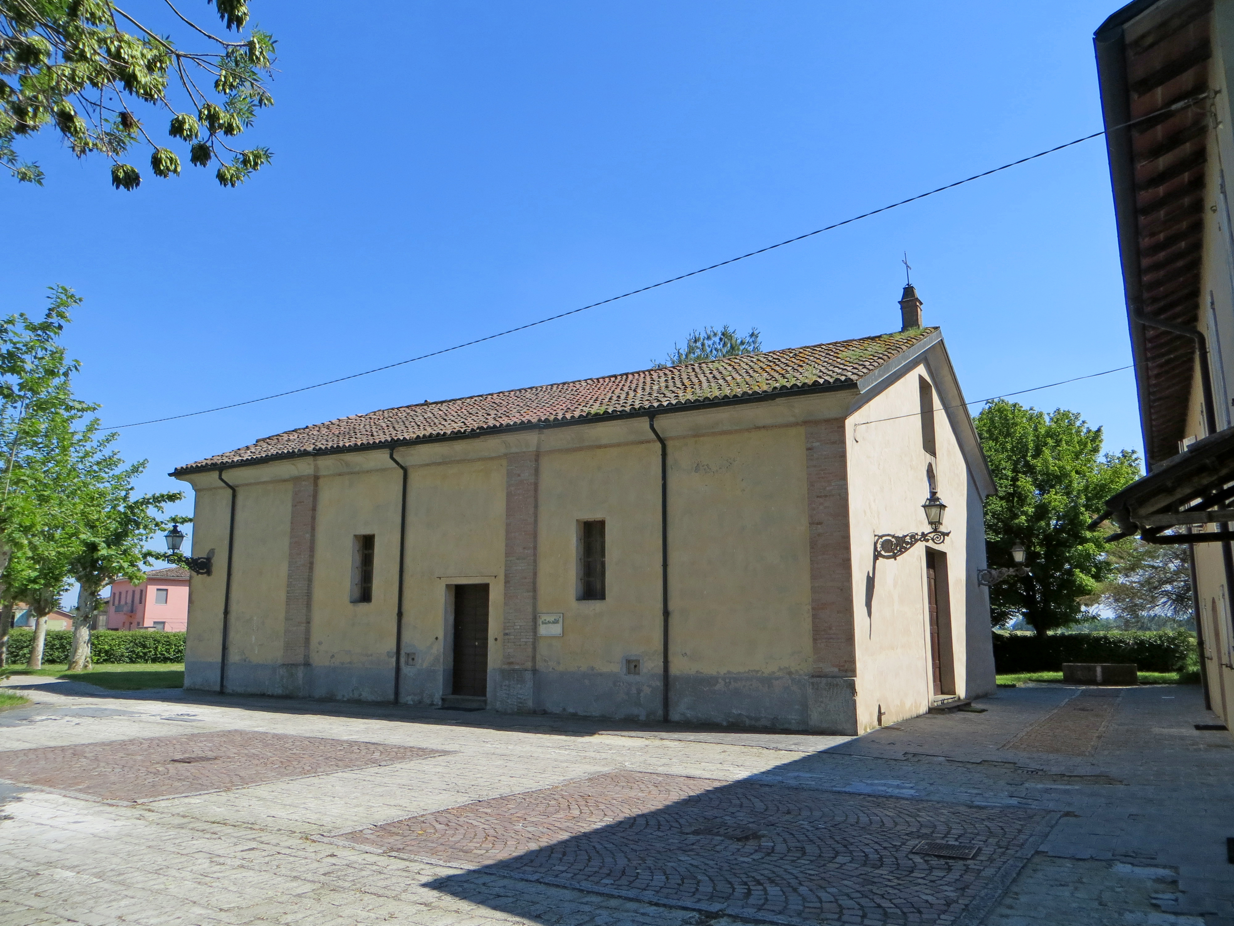 Chiesa di San Giovanni Evangelista (Castelnovo - Parma) - lato nord